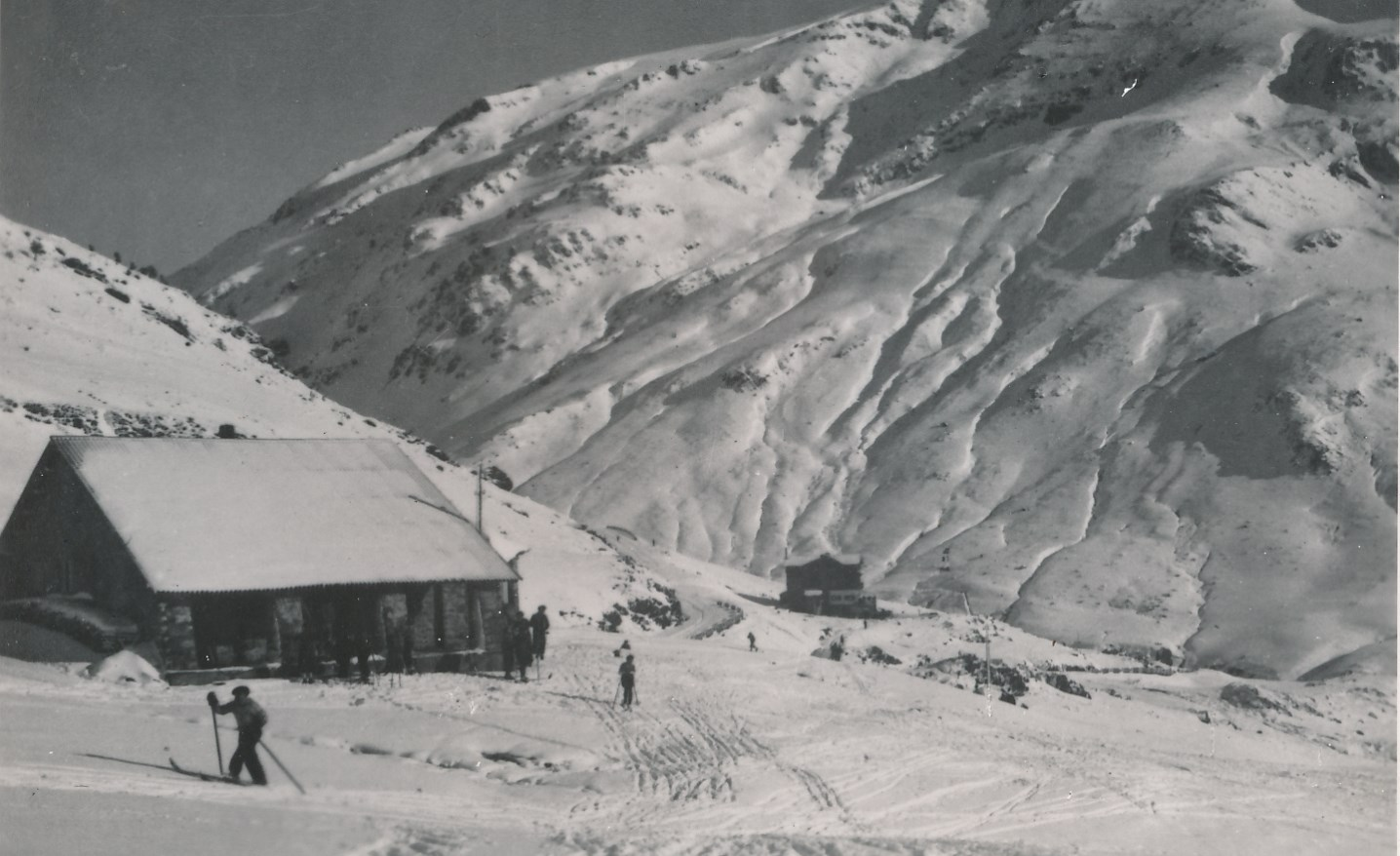 Candanchú (Huesca), noviembre 1946 Procedencia: Archivo Fotográfico de la Dirección General de Turismo (1951-1992) Fotógrafo: Registro nº: 00133 Signatura: Caja 2 Fondos: Biblioteca de la Facultad de Empresa y Gestión Pública (Universidad de Zaragoza) Legado: Luis Fernández Fuster / E.S. Turismo Huesca